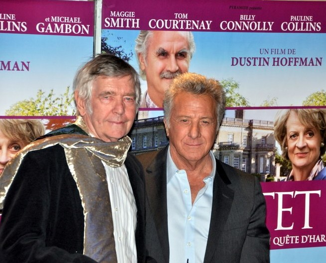 Tom Courtenay and Dustin Hoffman in Paris at the French premiere of "Quartet"